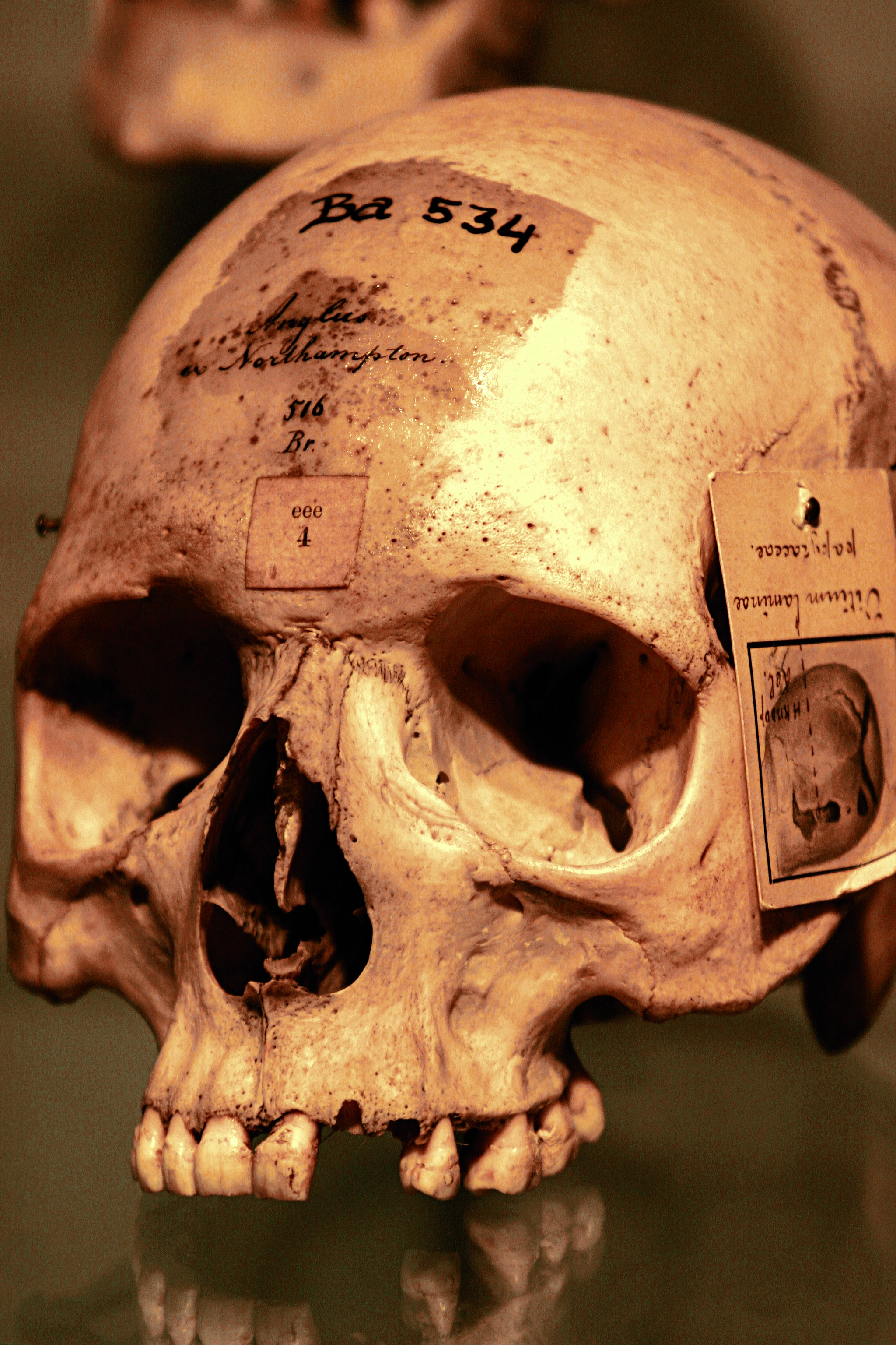 Museum Boerhaave, Leiden - Skull by Sebaldus Justinus Brugmans.jpg Room 8